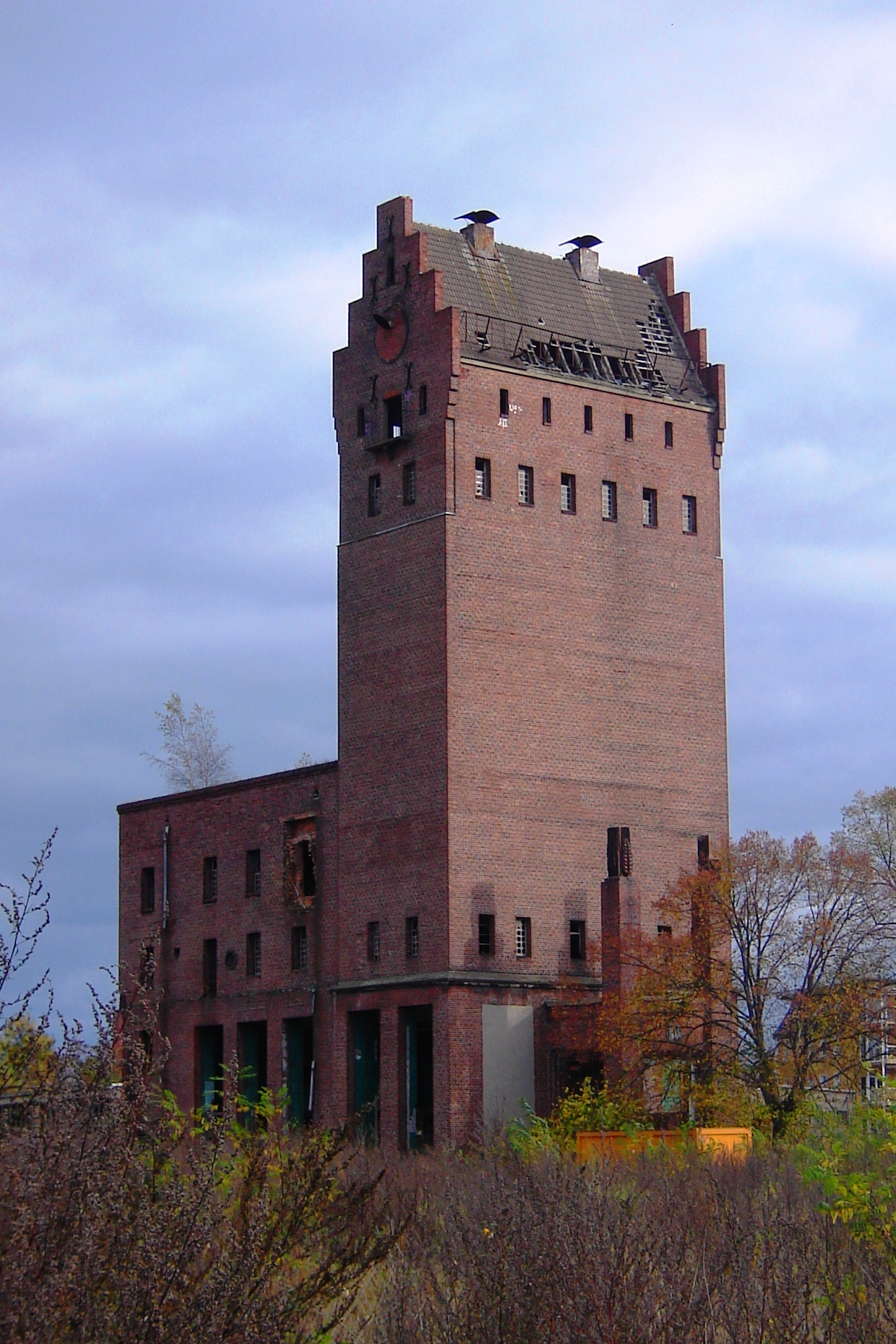 Magdeburg, Alte Neustadt, Sieverstorstraße: Siloturm der stillgelegten Börde-Brauerei (vormals Brauerei Bodenstein), erbaut 1936, unter Denkmalschutz